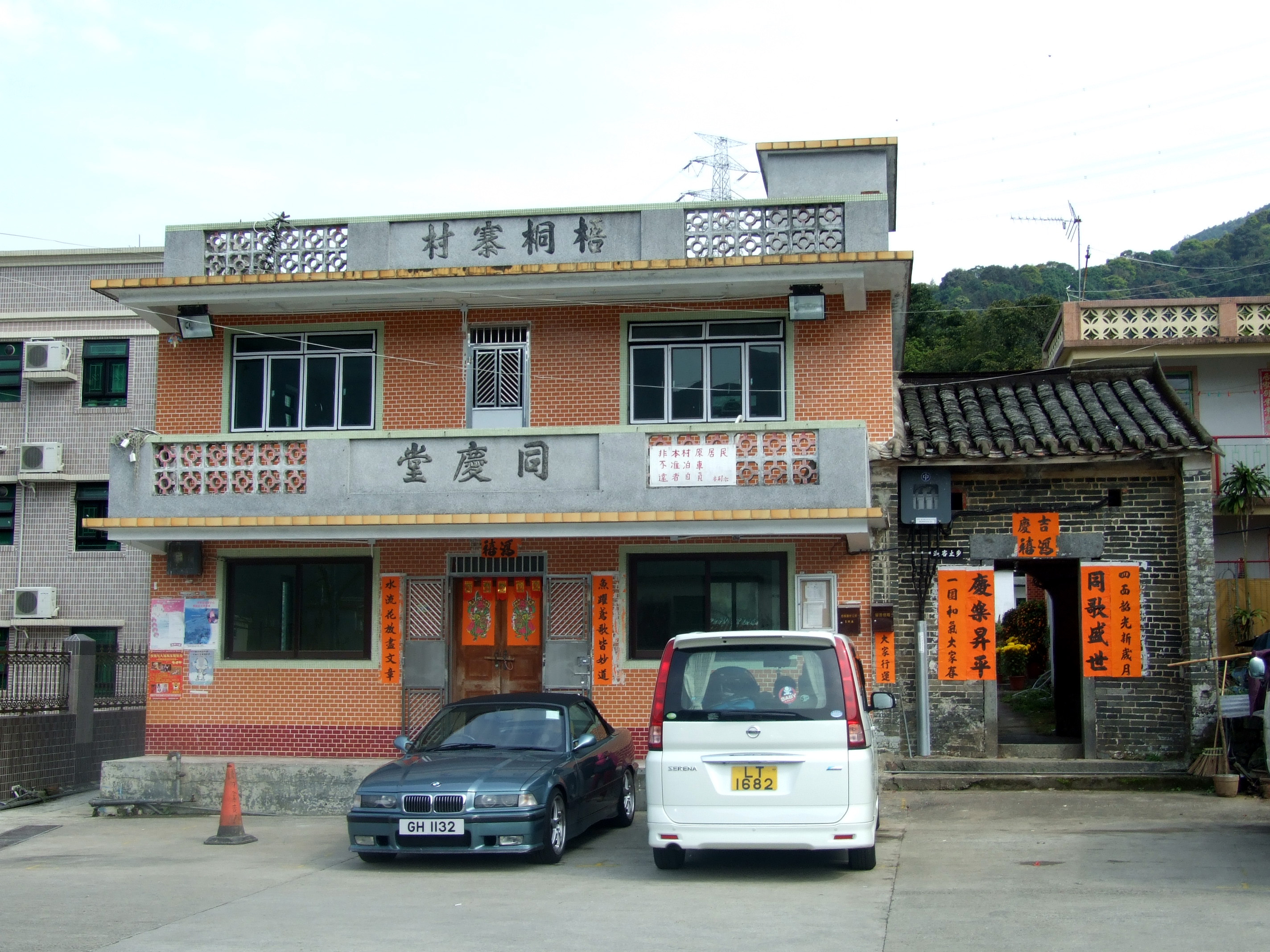 中文（香港）: 梧桐寨